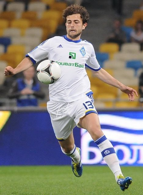 Адмір Мехмеді - швейцарський футболіст київського Динамо